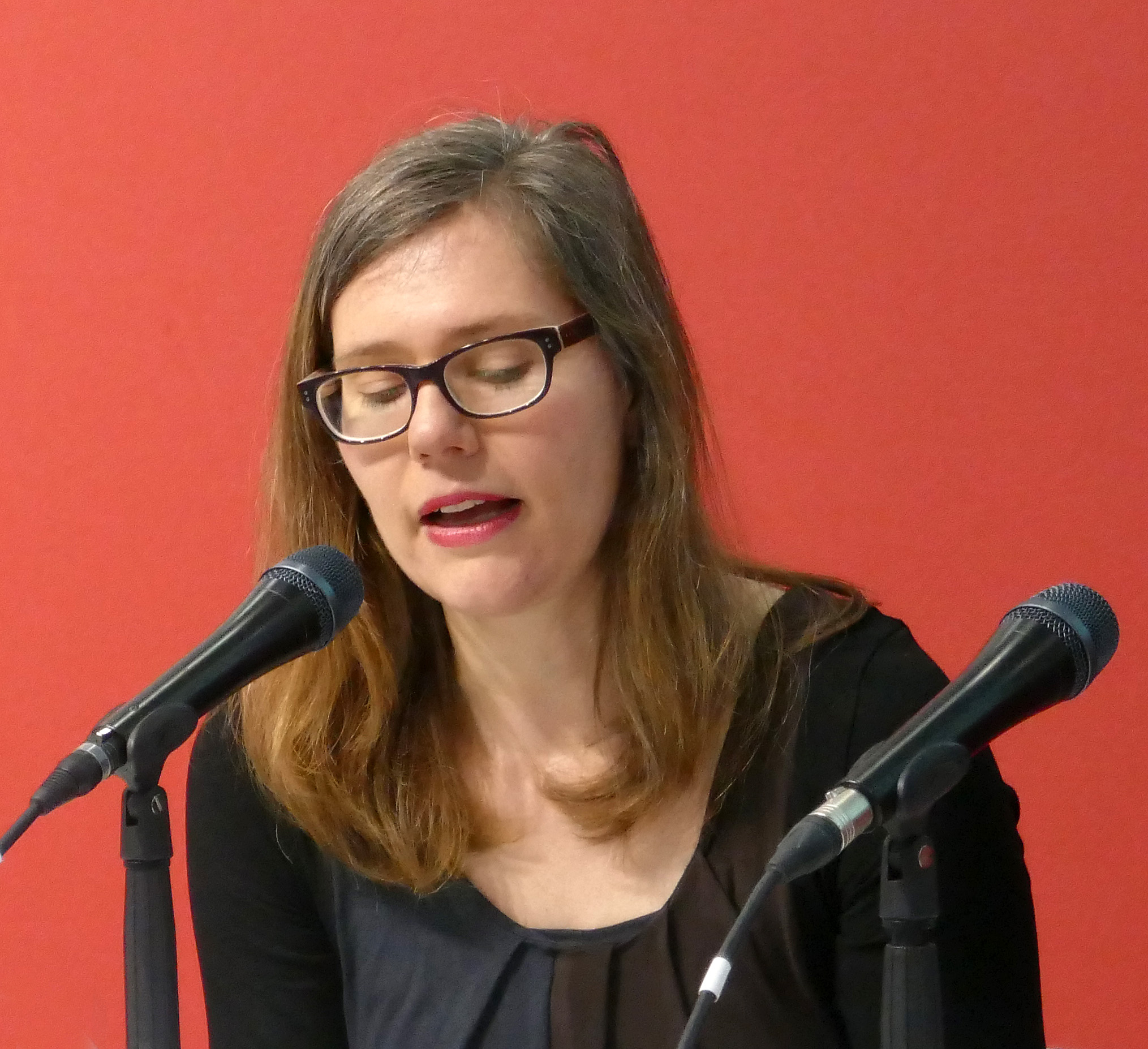 Nikola Richter à la Foire du Livre de Leipzig 2018.